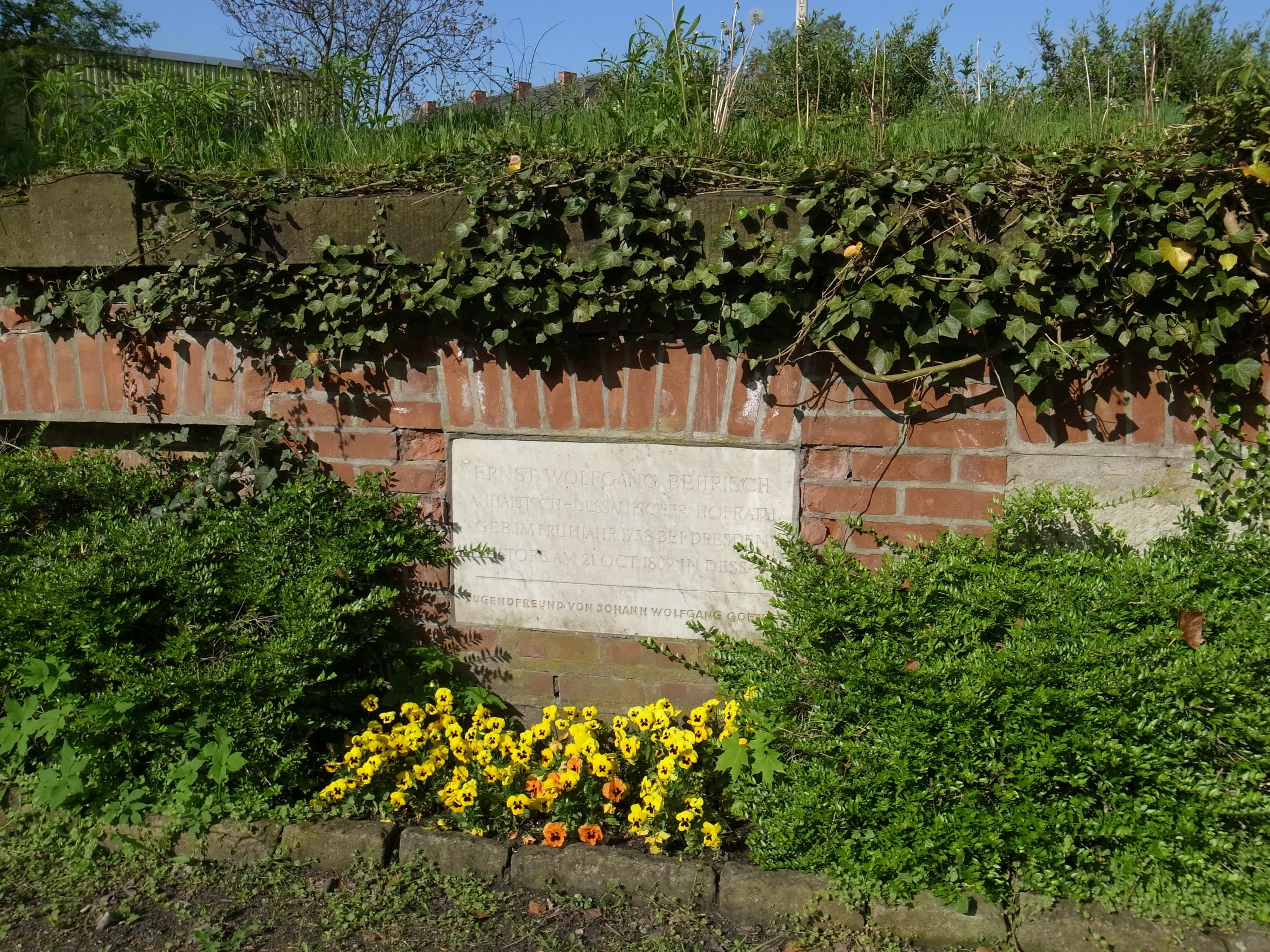 Ernst Wolfgang Behrisch, Ruhestätte in der Gruftmauer auf dem Neuen Begräbnisplatz (Dessau).